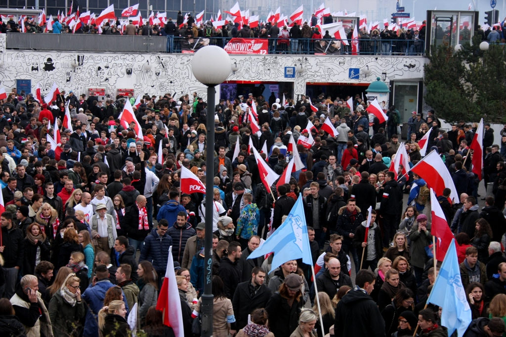 Uczestnicy marszu na warszawskiej "patelnii".